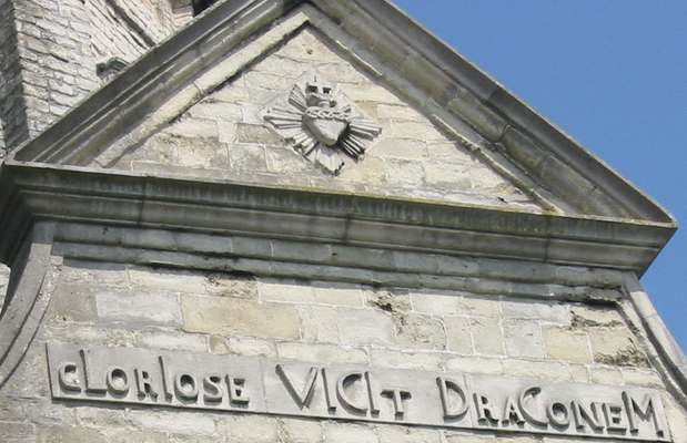 bouwjaar van de kerk van Rupelmonde (eigen foto)